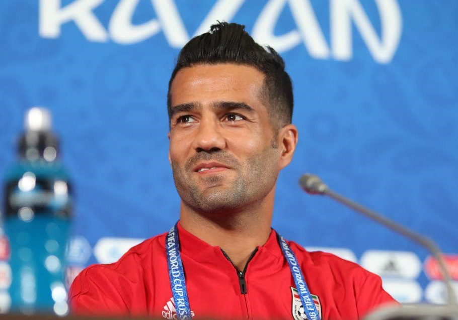 مسعود شجاعی در نشست خبری پیش از دیدار تیم فوتبال ایران و اسپانیا